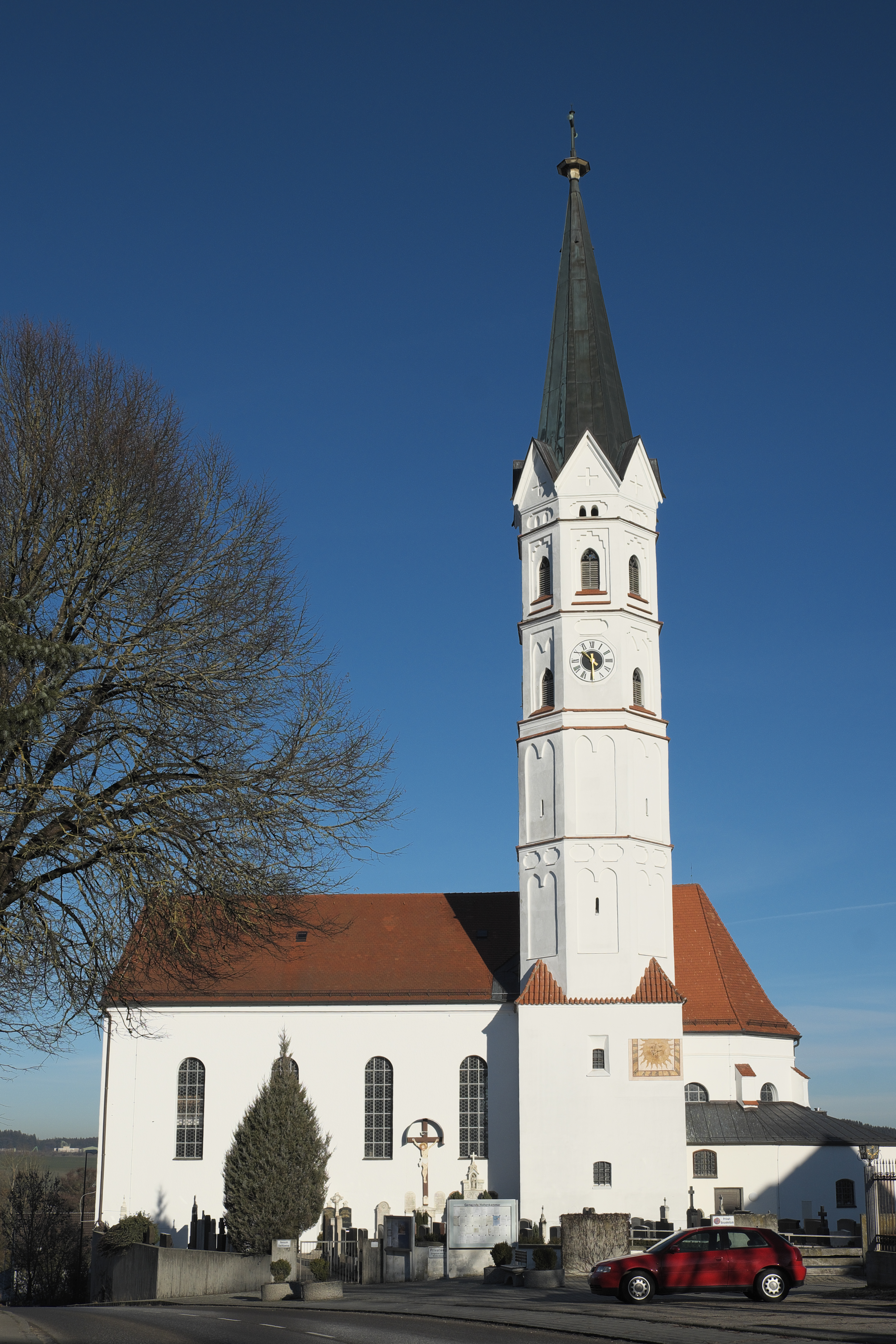 Katholische Pfarrkirche St. Johannes Evangelist in Hohenkammer im Landkreis Freising (Bayern/Deutschland)